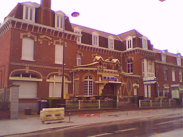 Mairie de Forest-sur-Marque